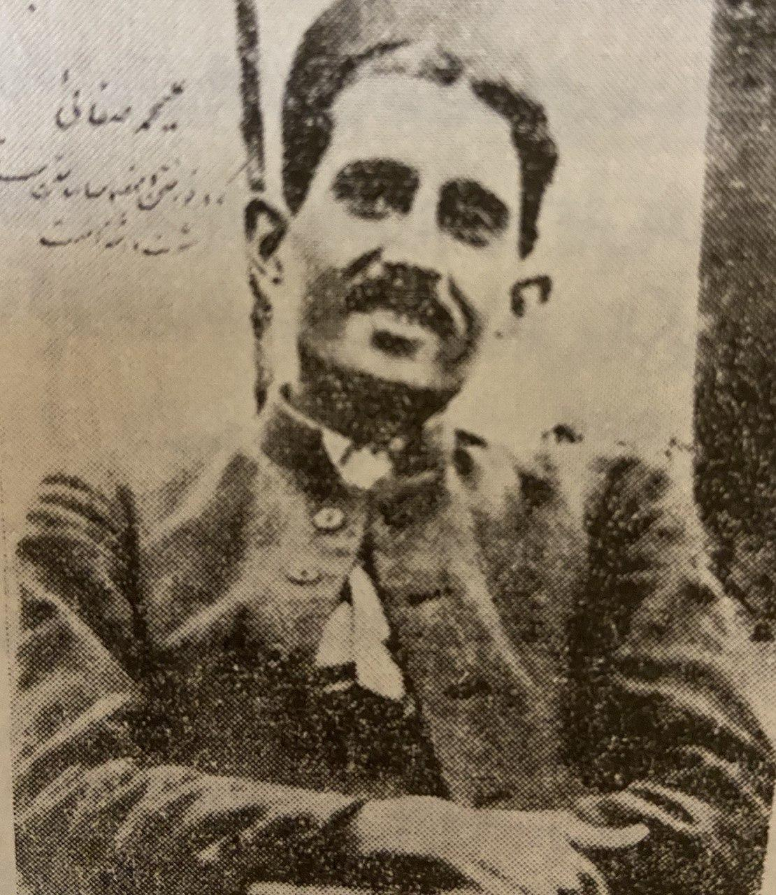 علی‌محمد صفایی نوازنده و سازندهٔ سه‌تار